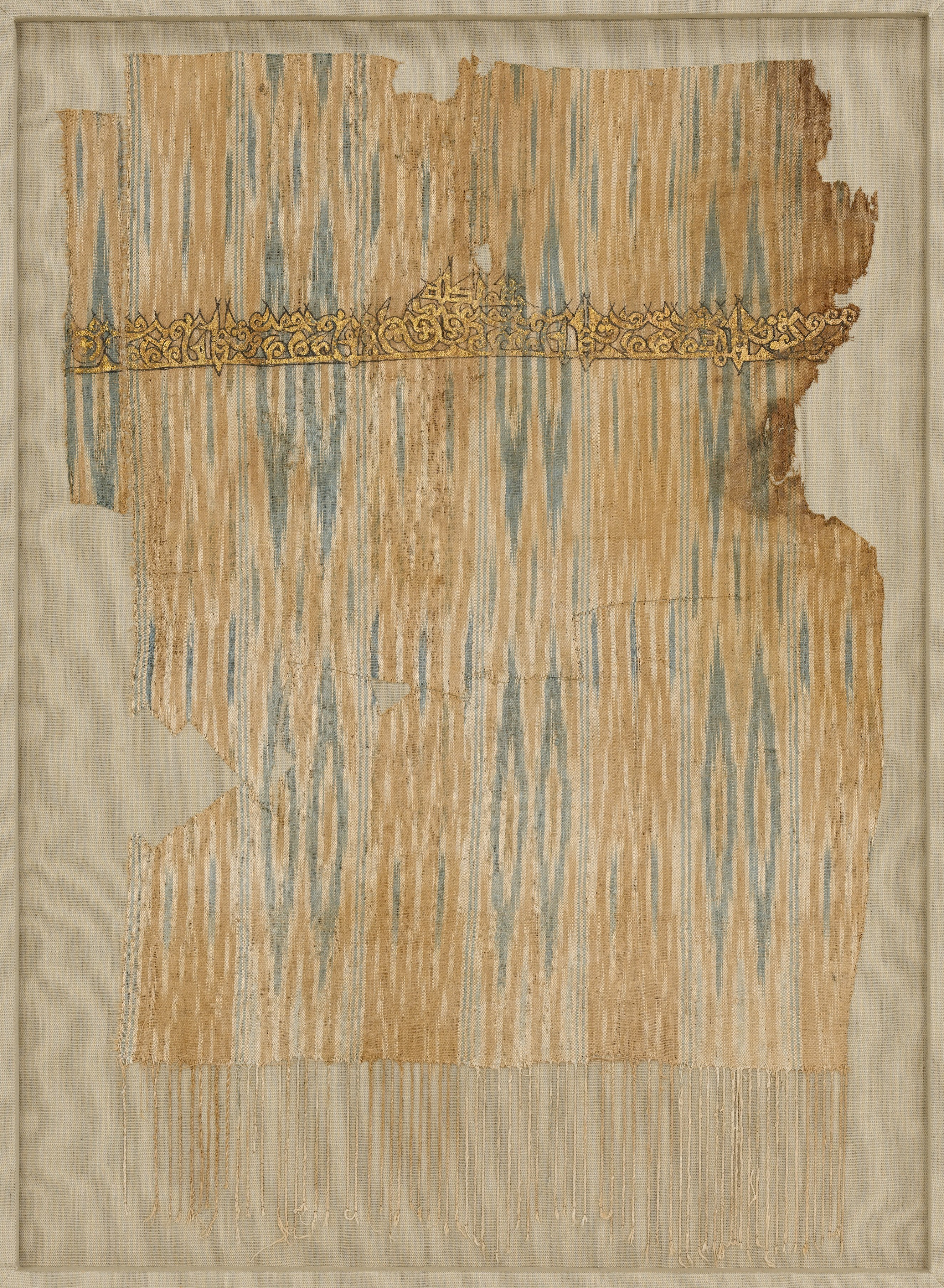 Tiraz fragment; Textiles